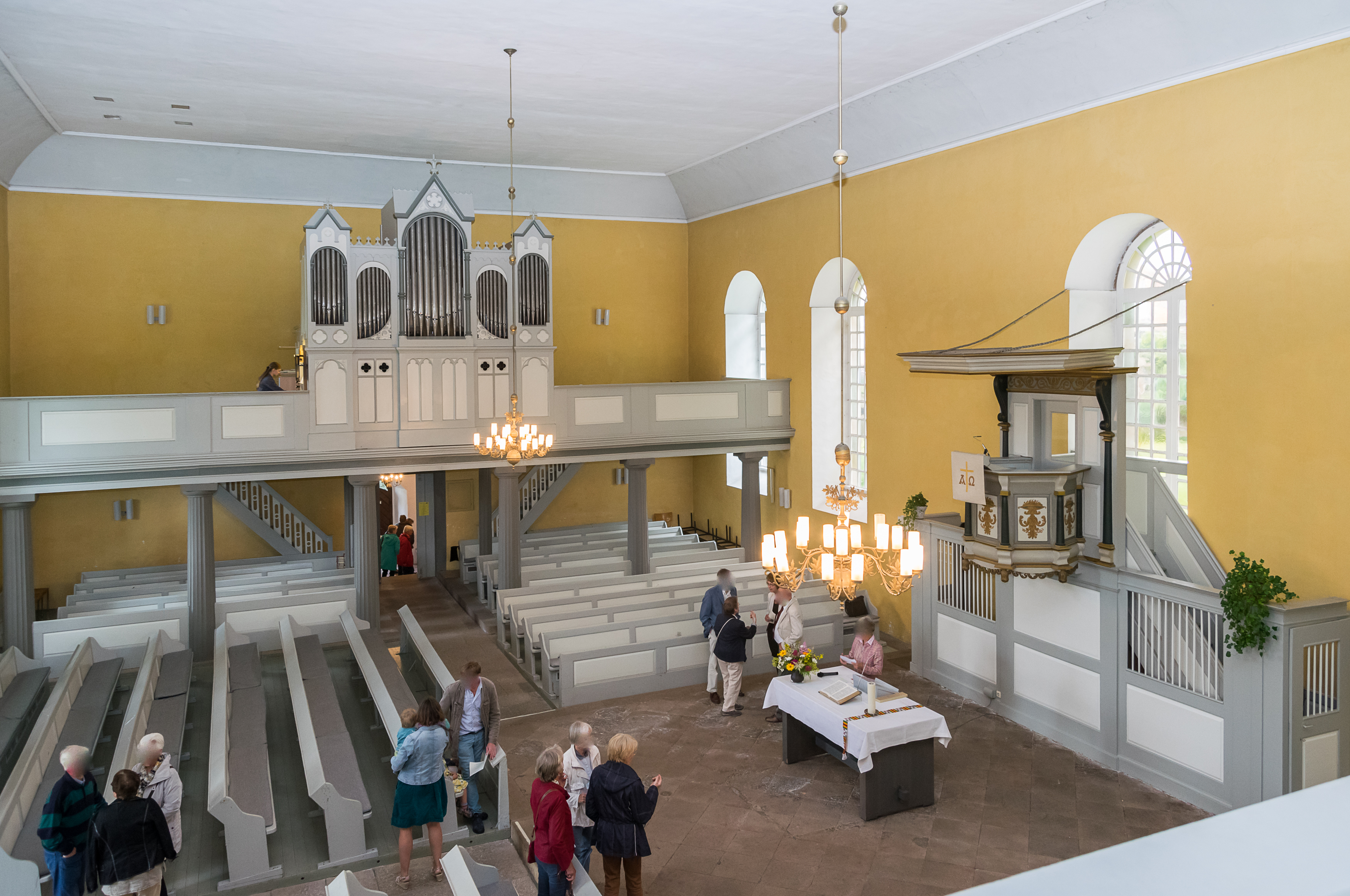 Evangelisch-refomierte Kirche in Blomberg-Cappel; Innenraum